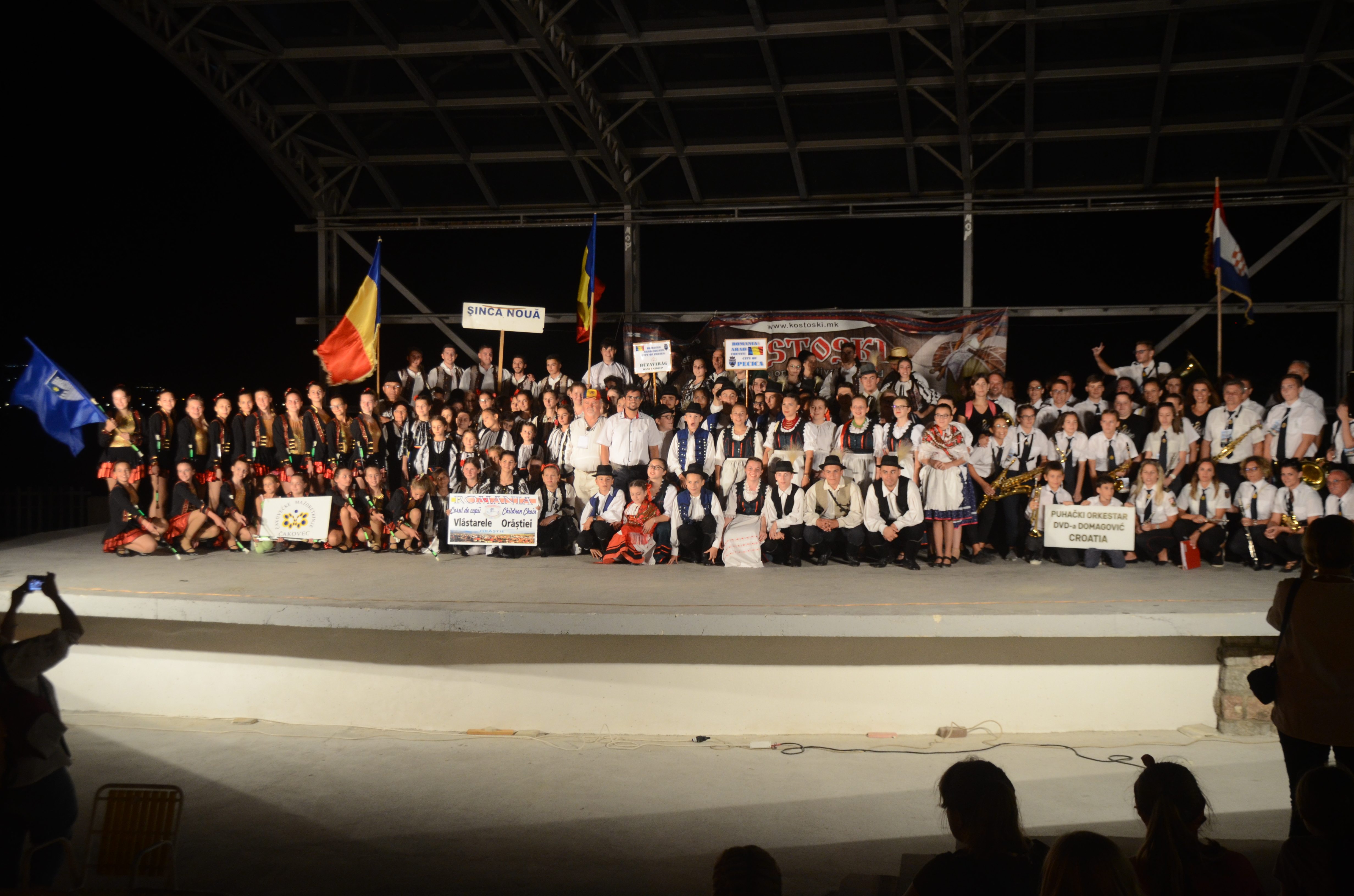 Učesnika na Kostoski Festivala